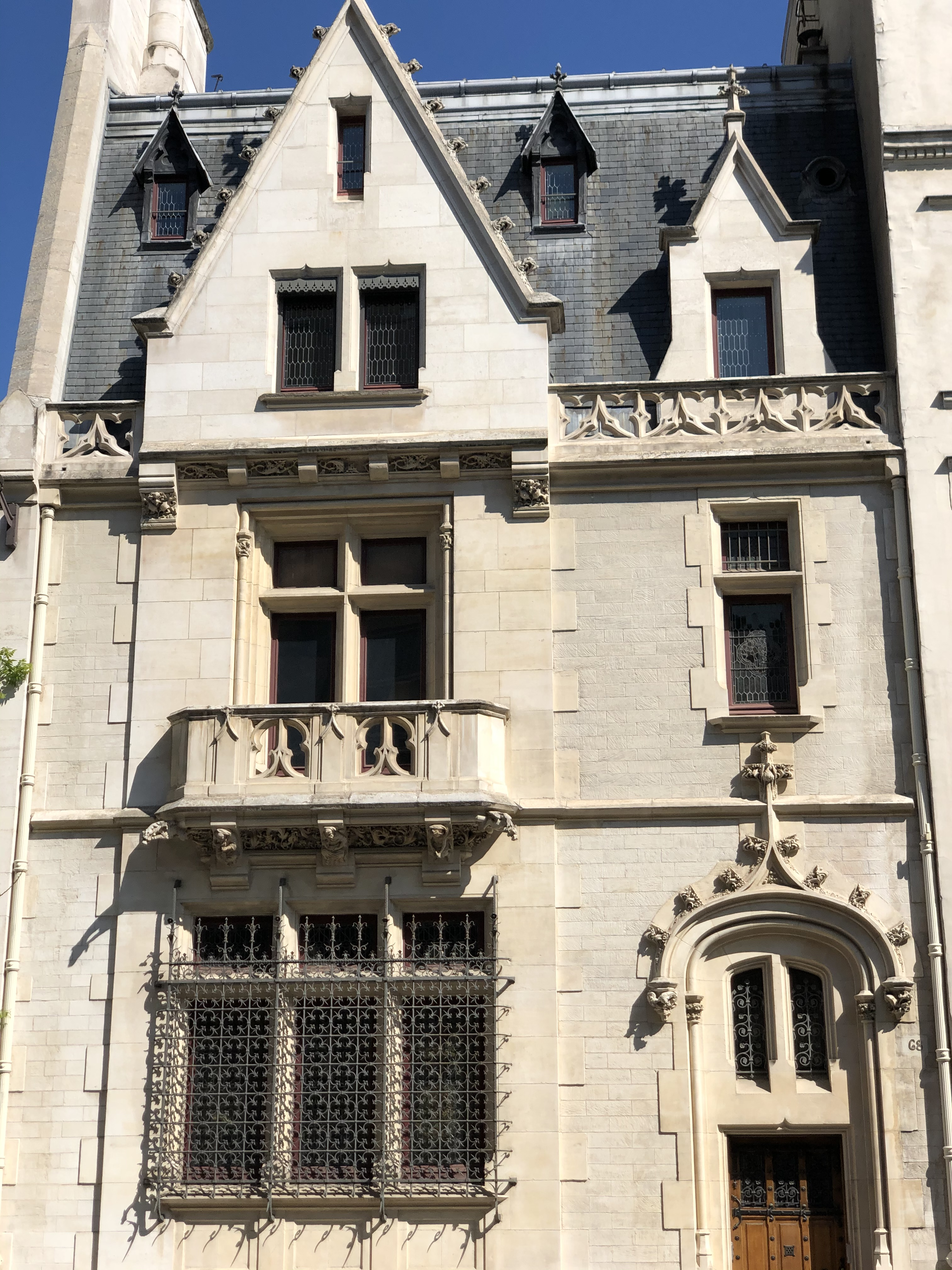 Hôtel particulier XIXème siècle, de style néo gothique, inscrit à l'inventaire des Monuments Historiques (68 rue Ampère, Paris 17)